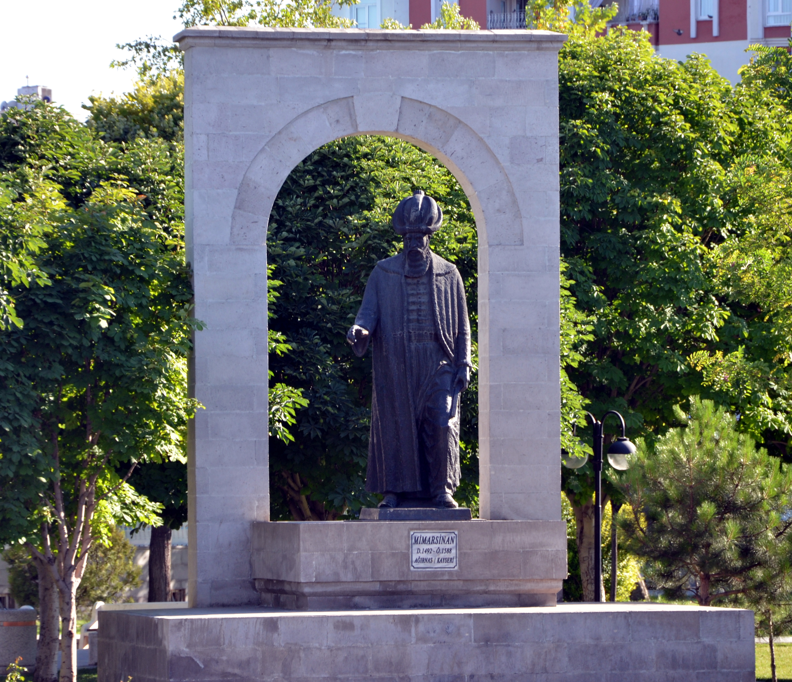 Kayseri Mimar Sinan Parkında bulunan, 15. yy'da yaşamış Osmanlı Başmimarı Mimar Sinan'ın heykeli.